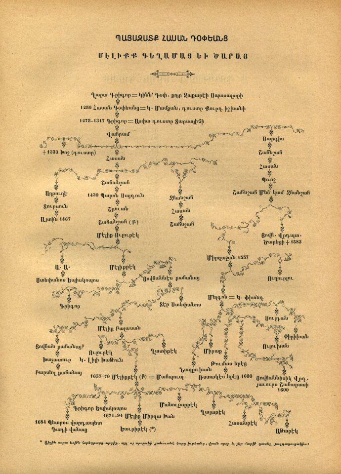 Генеалогическое древо рода Допян согласно Гевонду Алишану